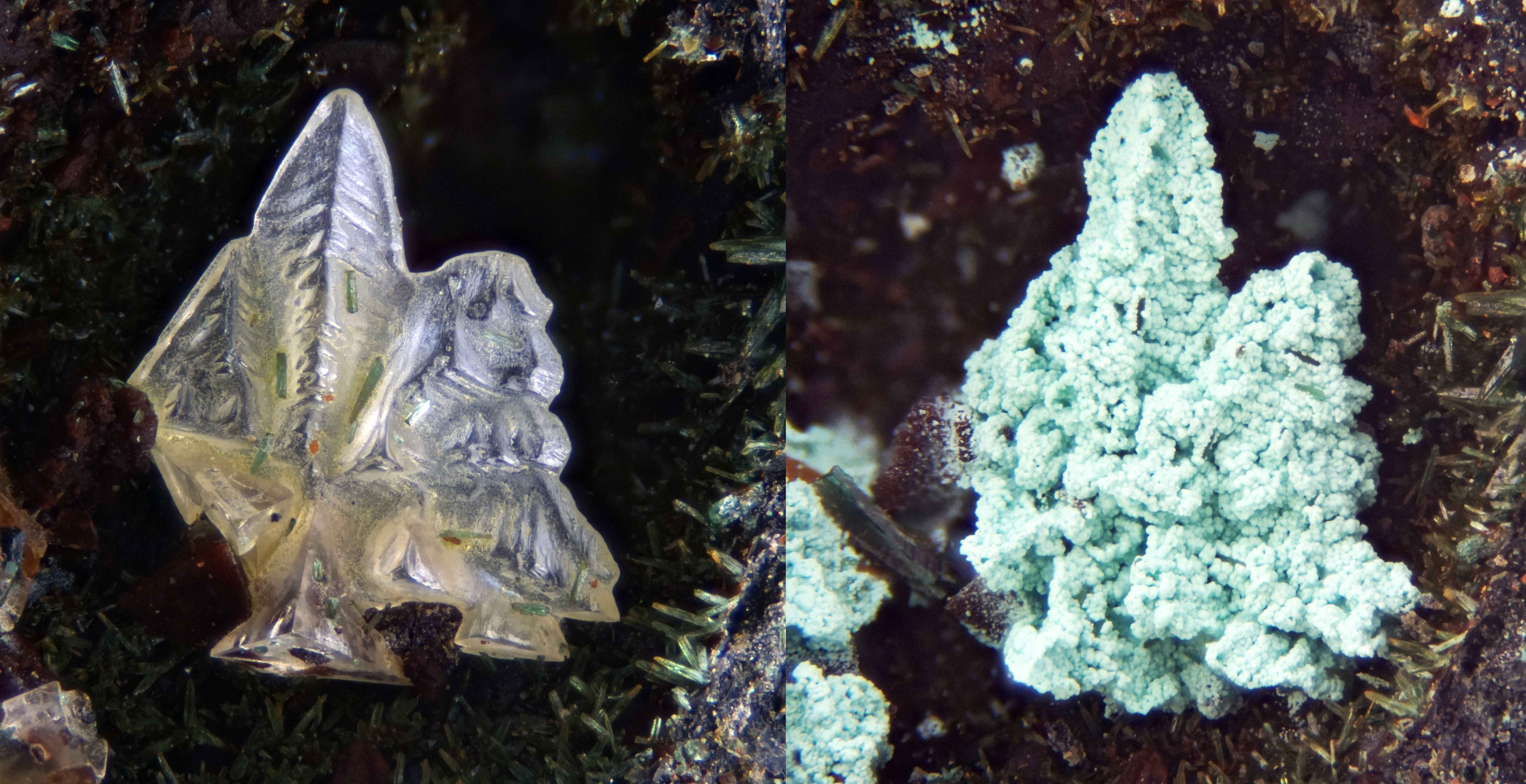 Baratti slag location Italy